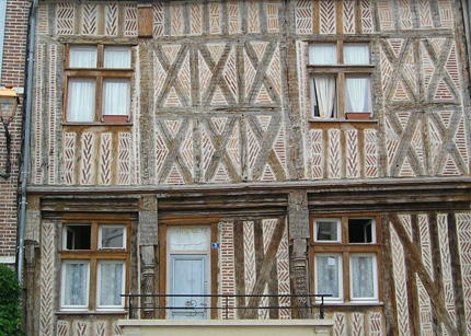 Maison à colombage à Toucy